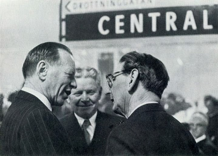 Jarl Berg, senare fastighetsdirektör, Stockholms stadsingenjör Gösta Lundborg och Yngve Larsson vid invigningen av T-centralen Stockholm